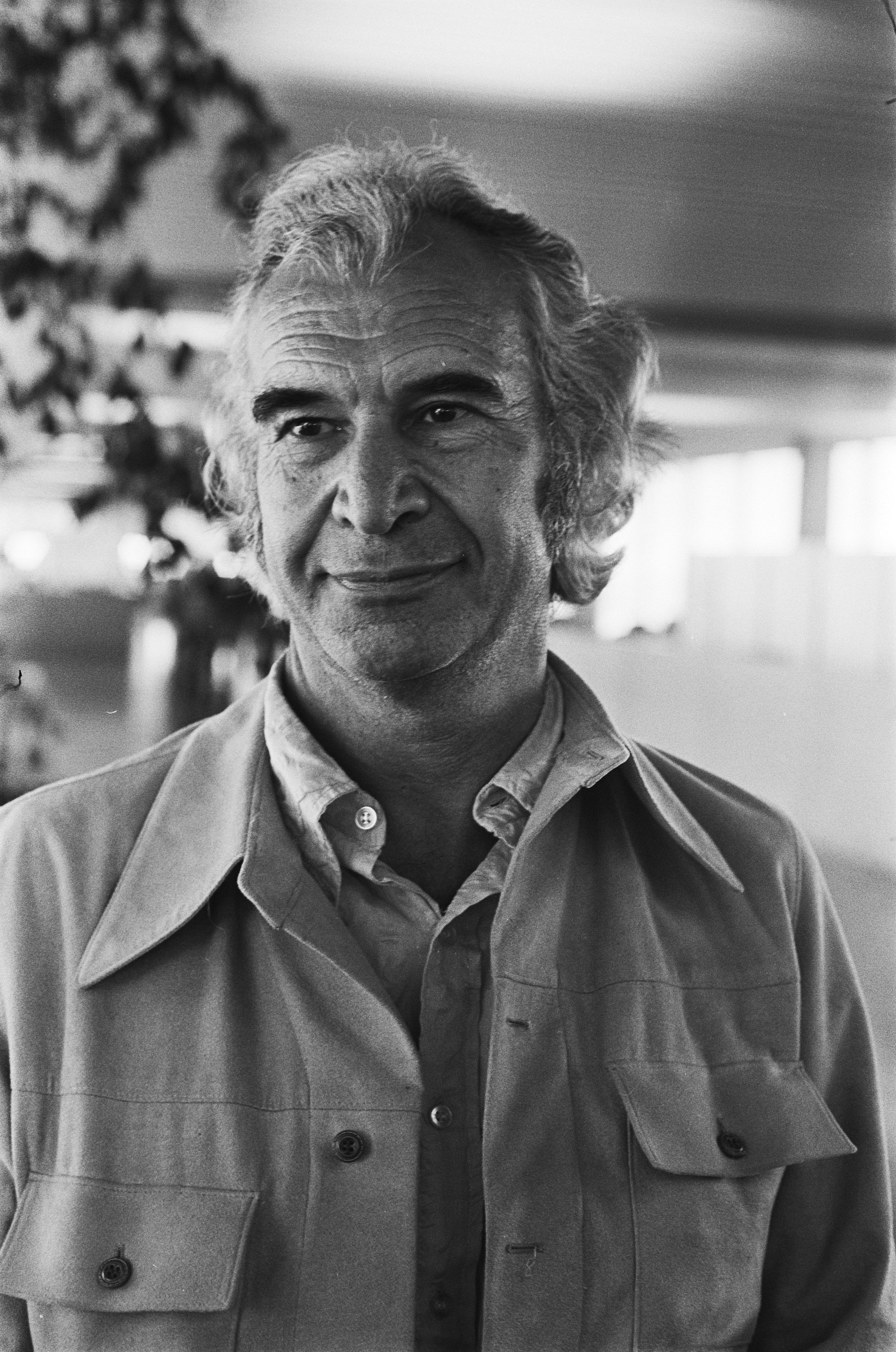 North Sea Jazz festival in Den Haag: Dave Brubeck.